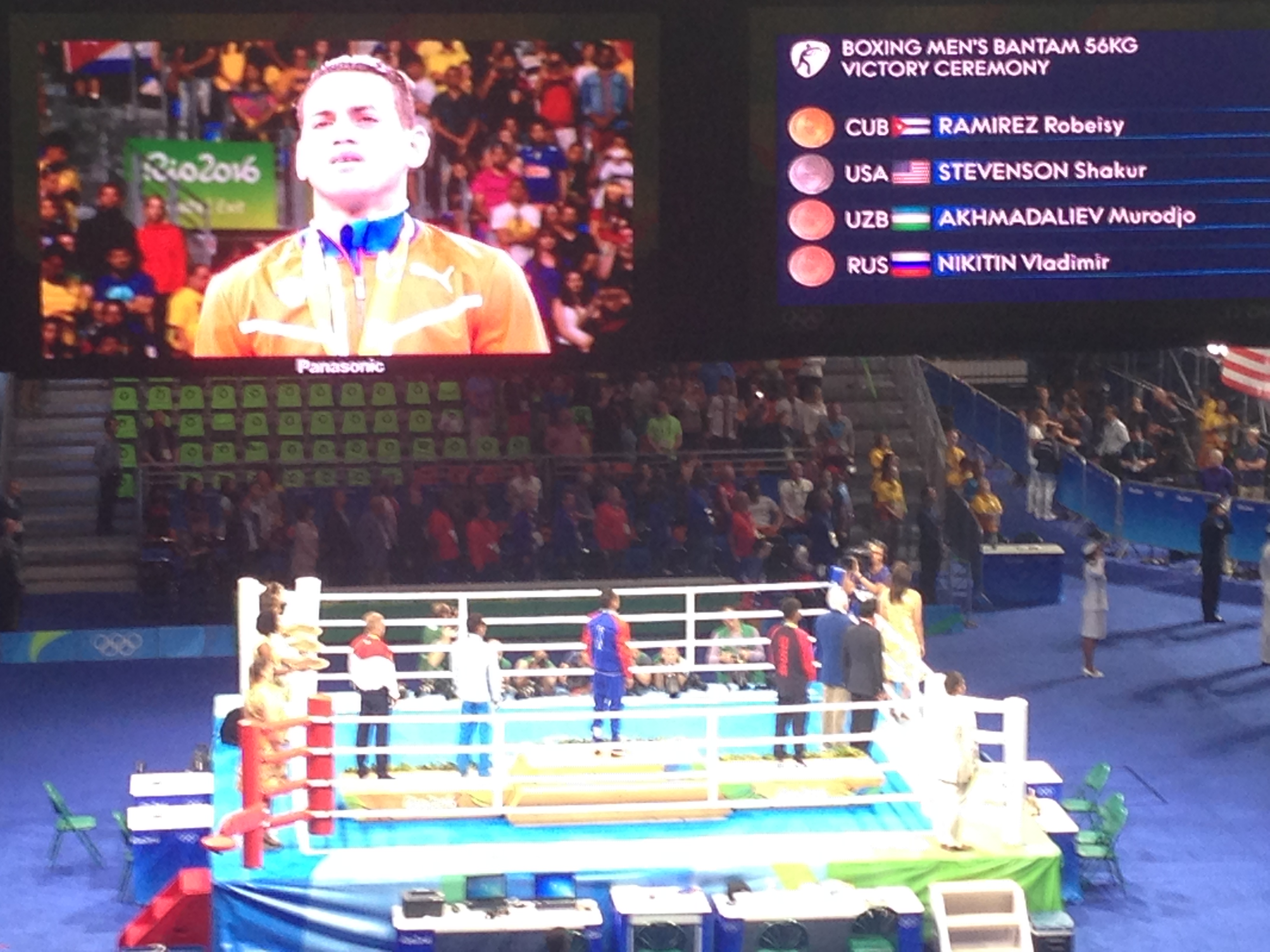 Cerimônia de premiação do boxe nas Olimpíadas Rio 2016 (até 56 kg)